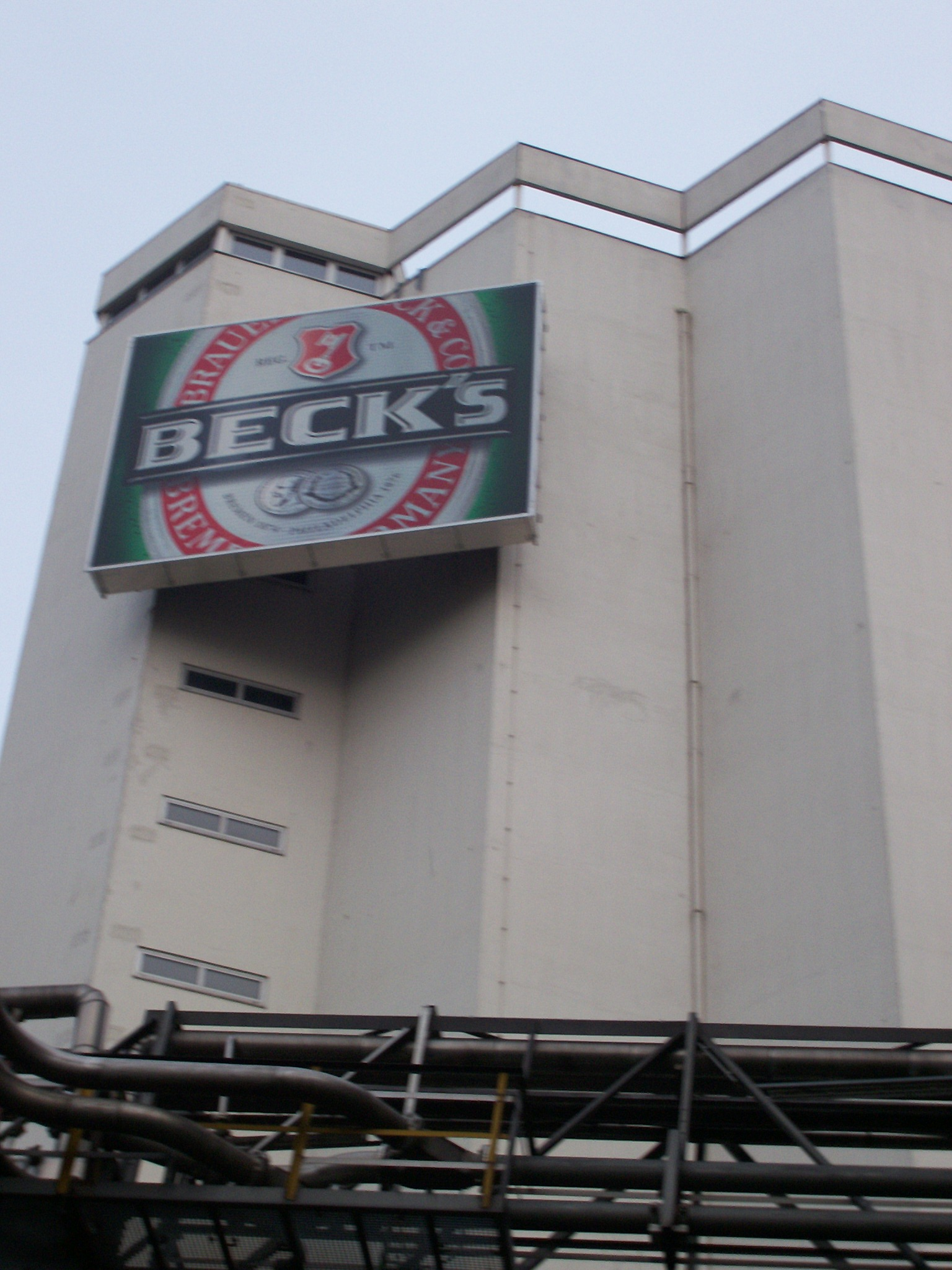 A Beck's Művek Brémában